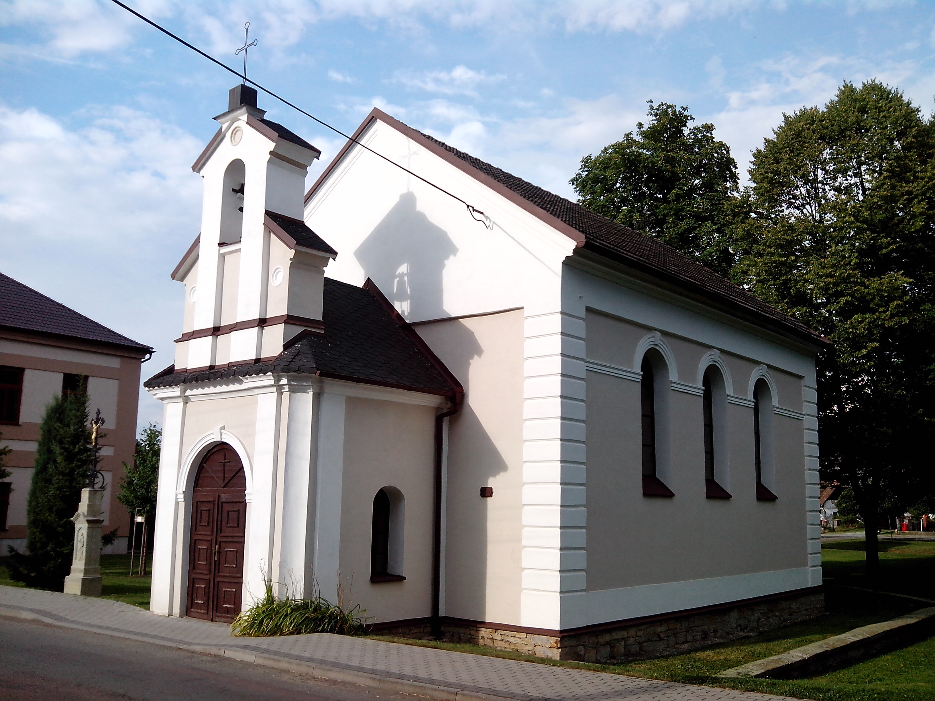 Kaple Panny Marie (Trnov)